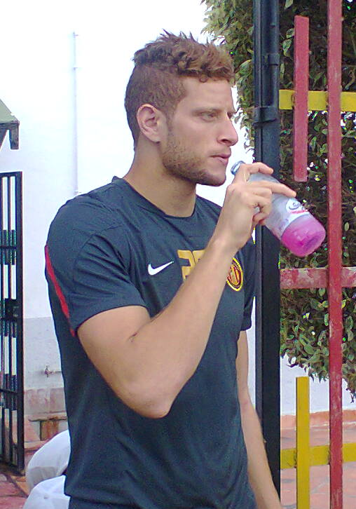 Fakhreddine Ben Youssef à l'entraînement